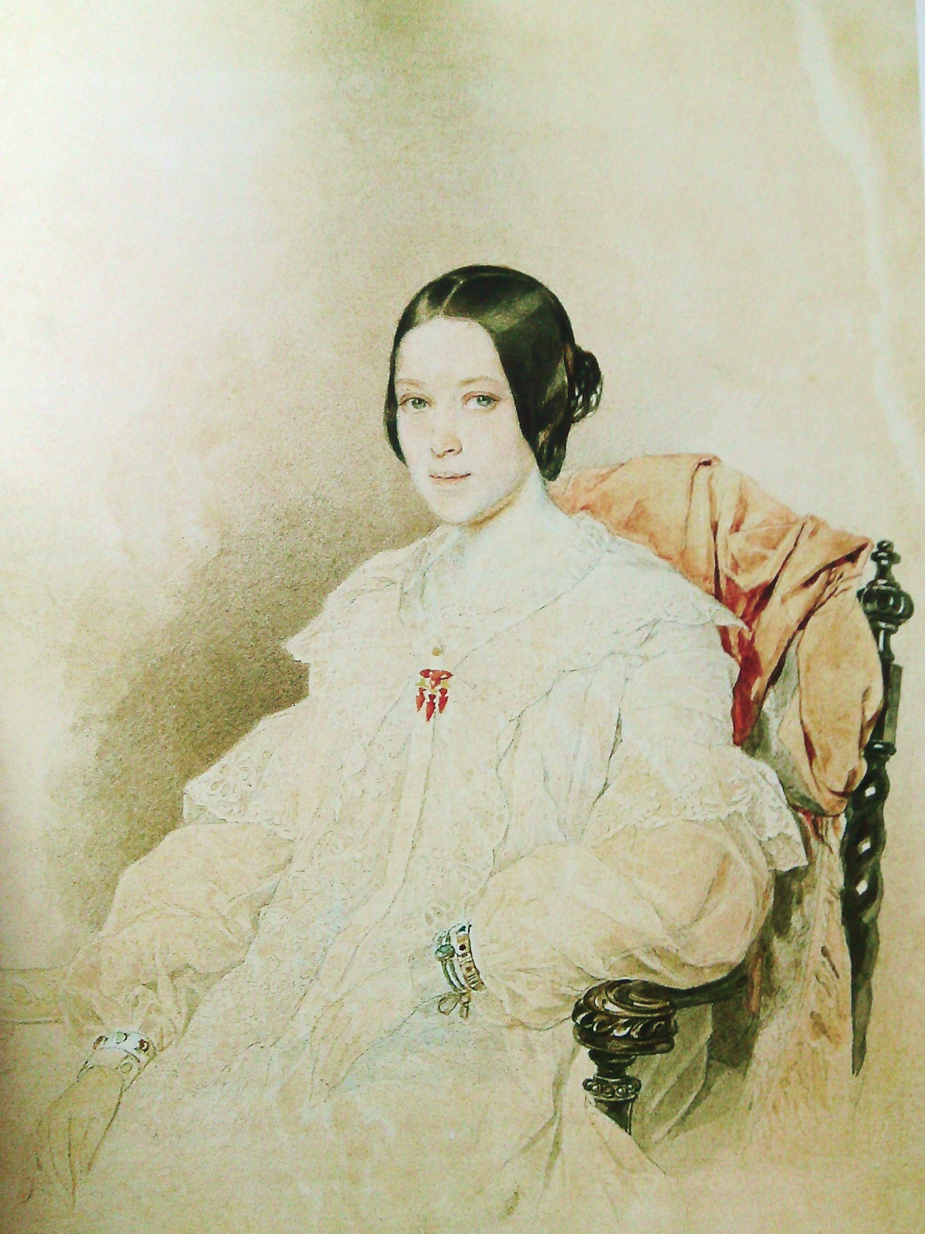 Юлия Фёдоровна Куракина (1814—1881), урож. Голицына.